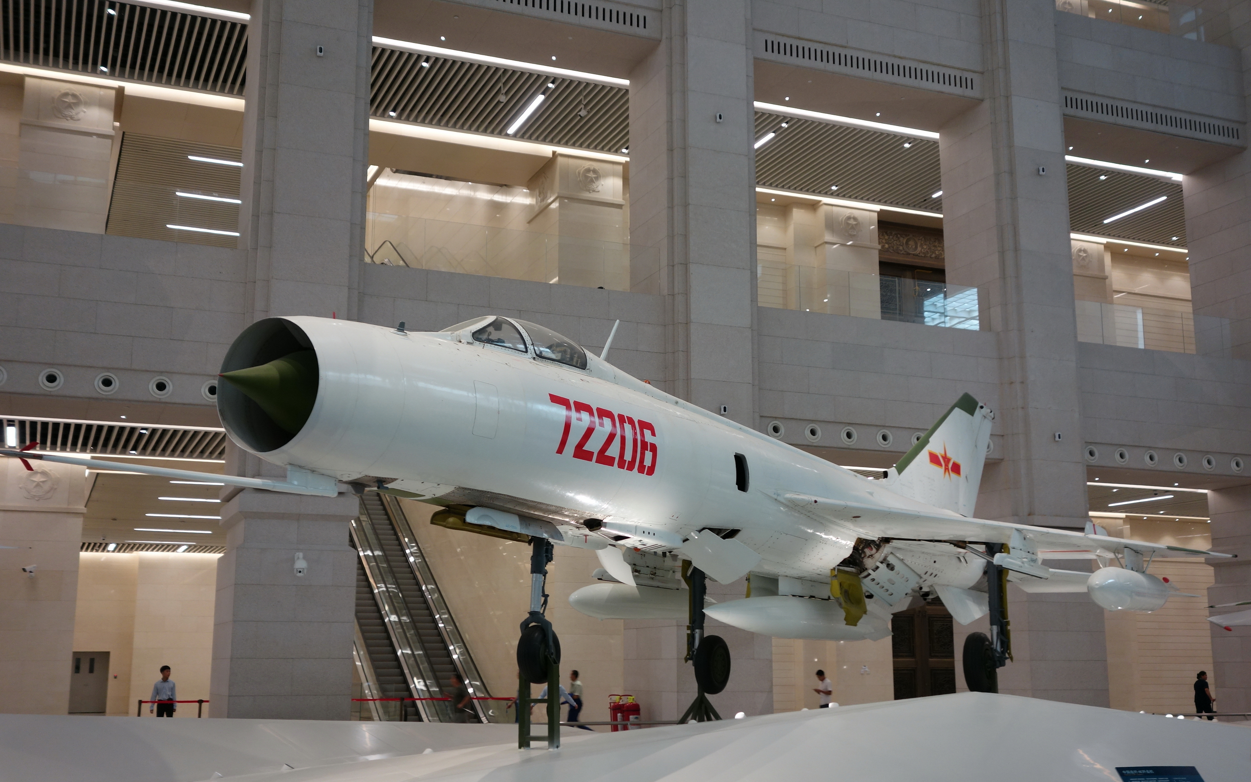 歼-8E歼击机，是歼-8I 的升级改进型，1992年首飞。